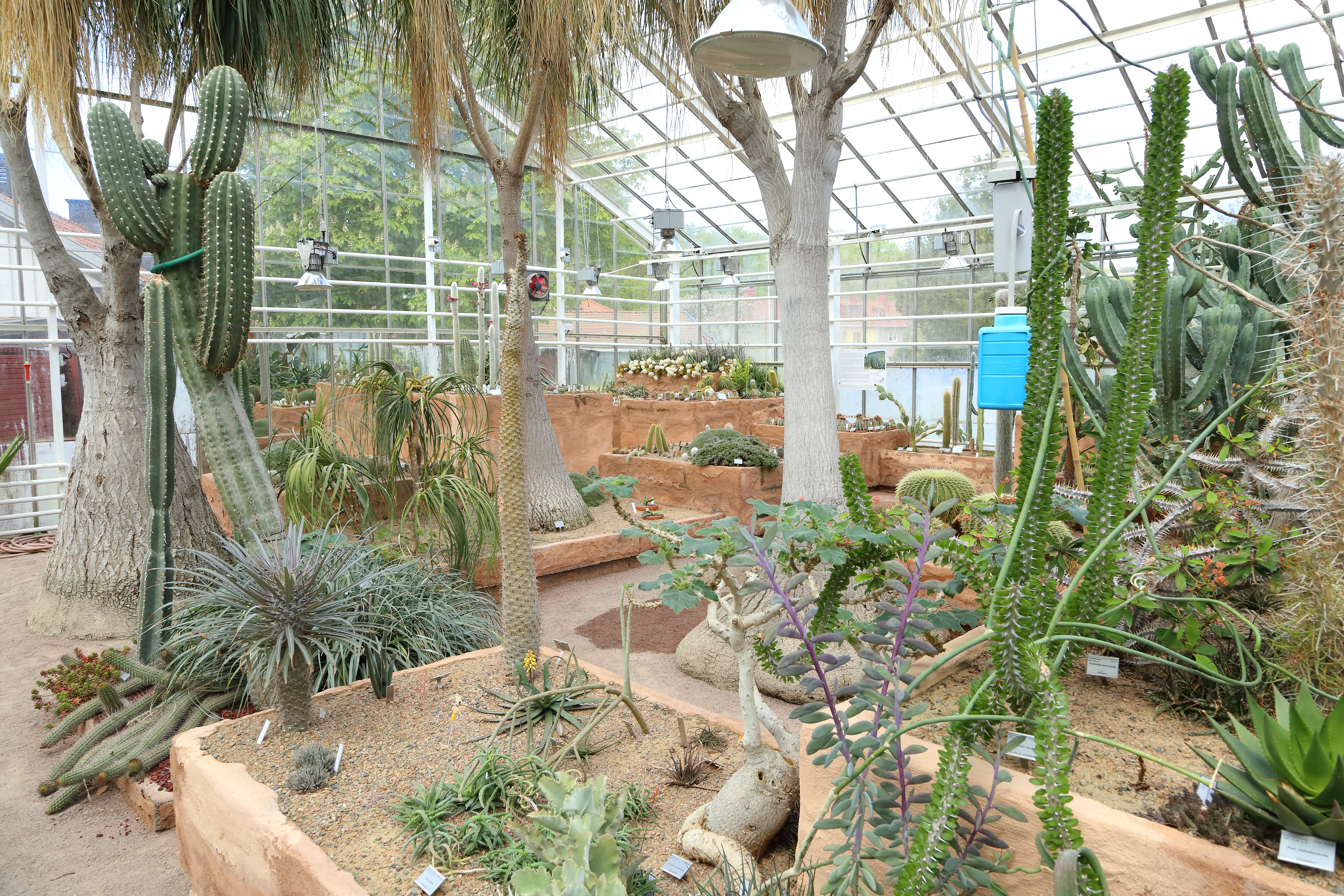 Göteborgs botaniska trädgård.